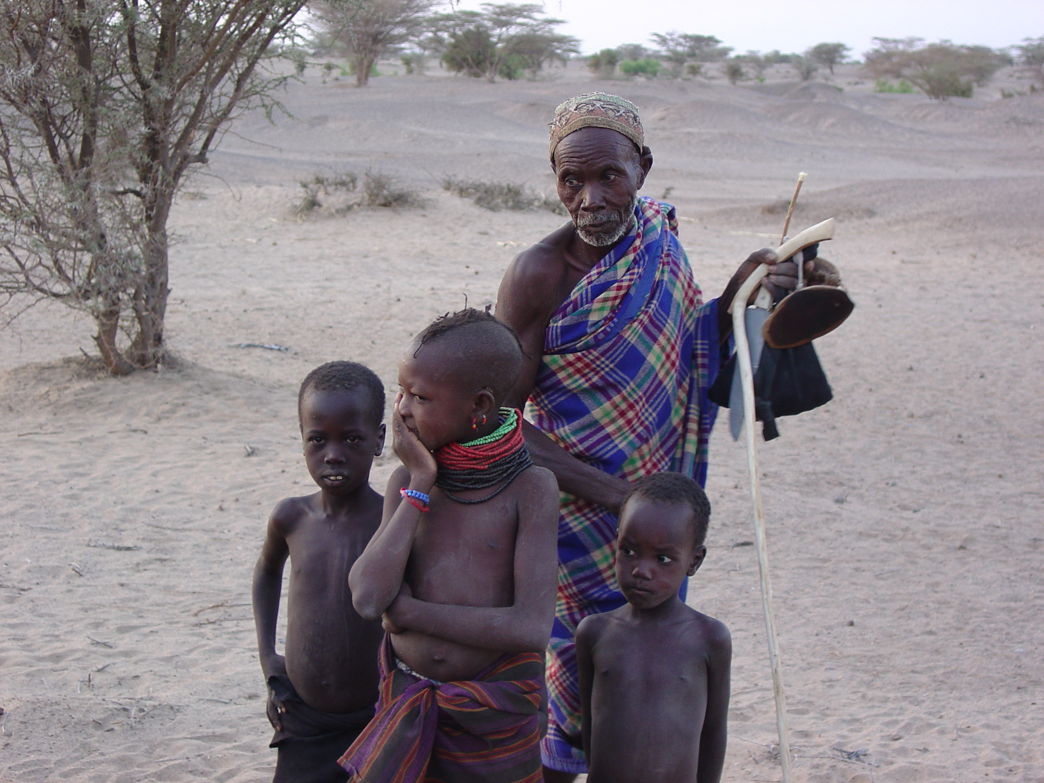 Turkana.